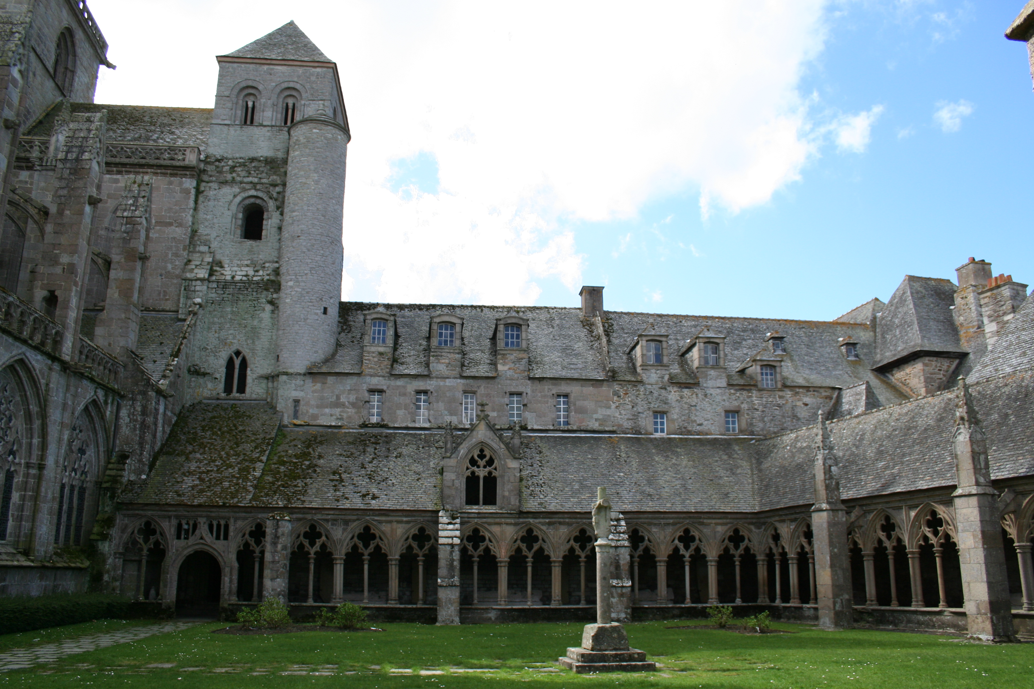 Cathédrale Saint-Tugdual de Tréguier - Tréguier - Côtes d'Armor - France. Tour Hasting et ailes ouest et nord du cloître. .